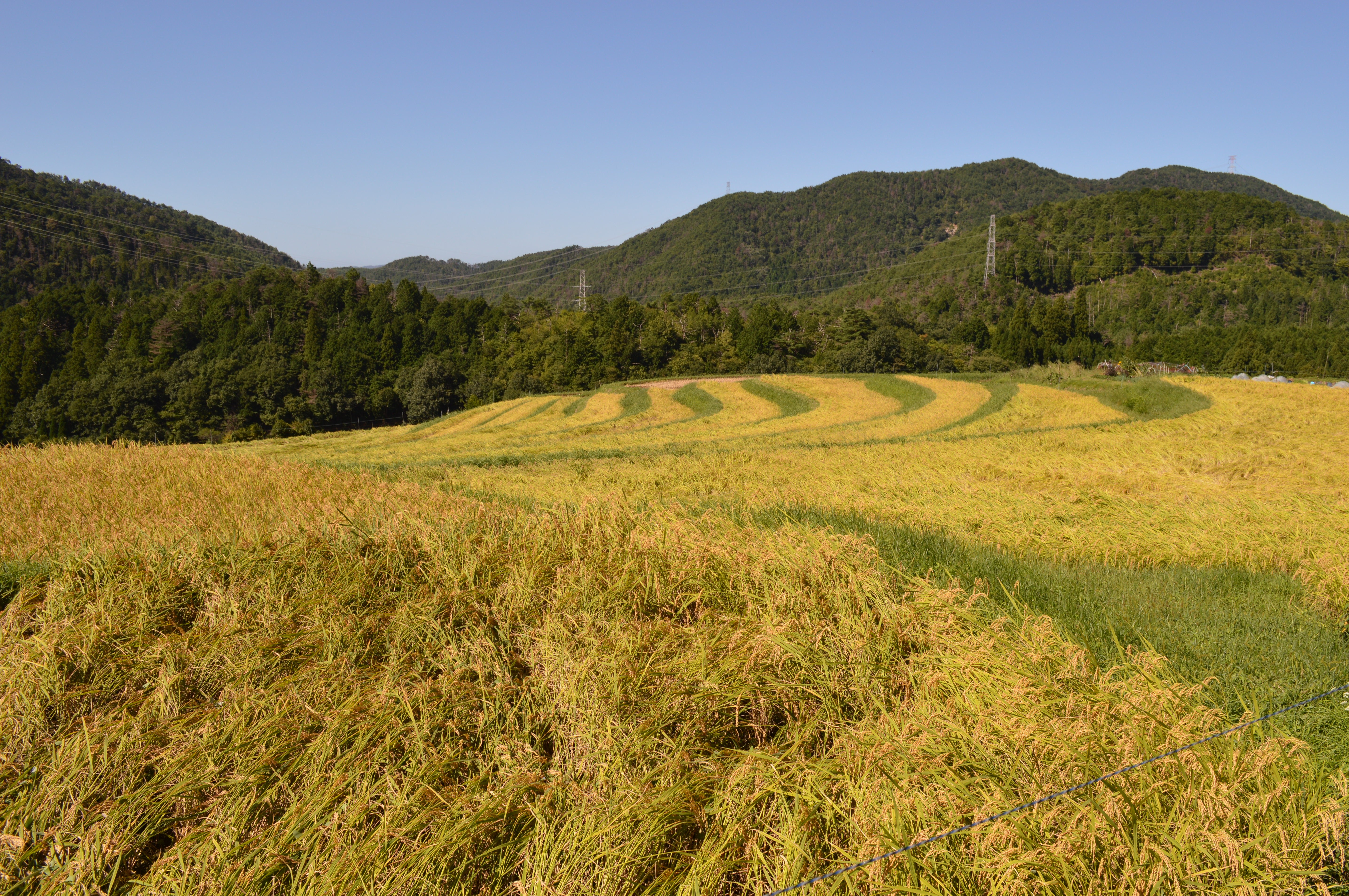 京都市右京区嵯峨樒原の棚田